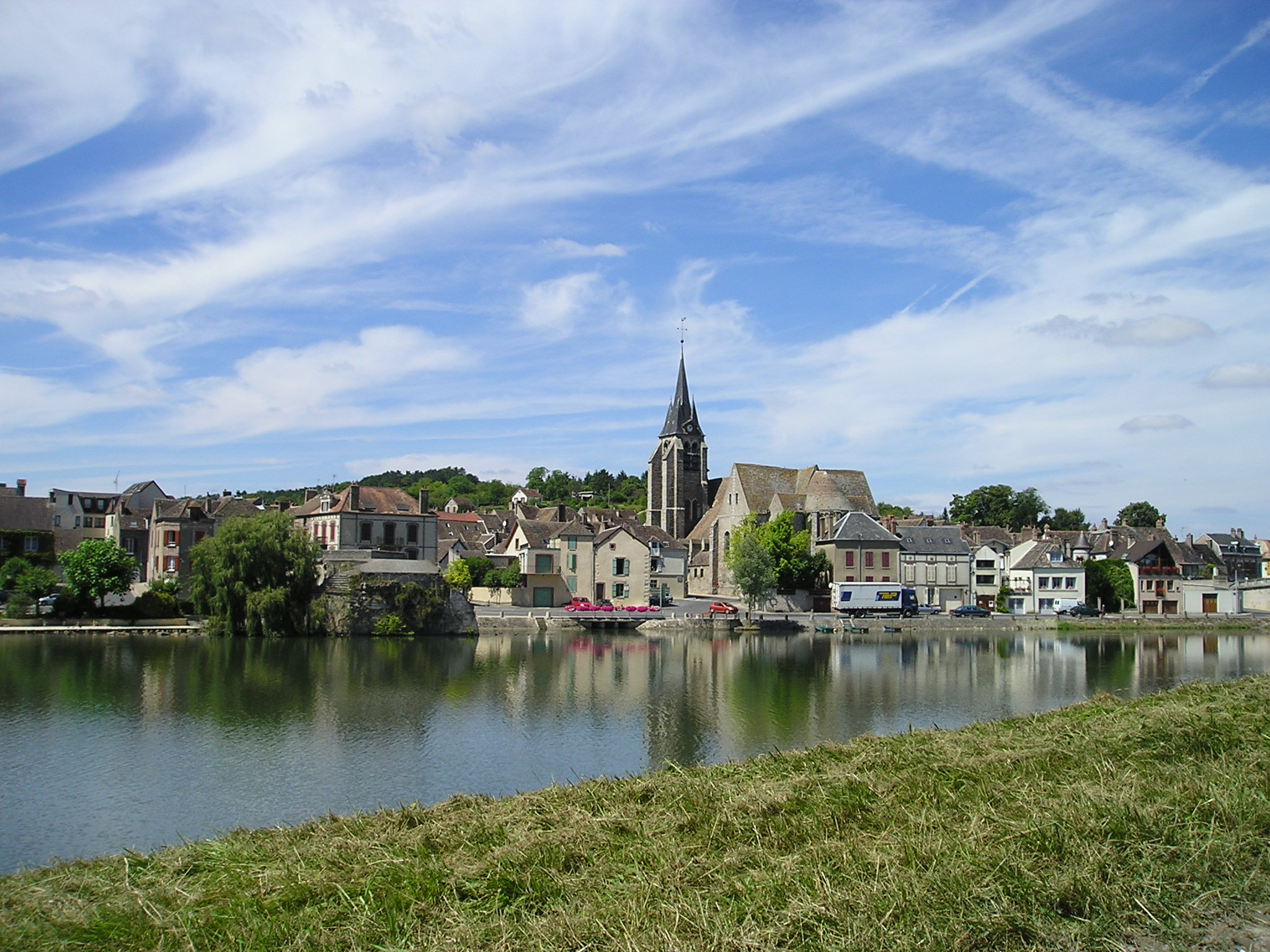 Pont-sur-Yonne